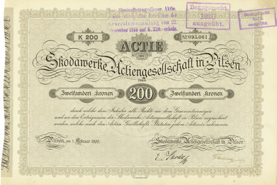 Aktie über 200 Kronen der Skodawerke AG vom 1. Februar 1900